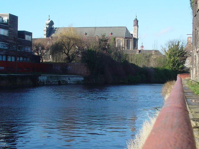 Beguinage Ter Hoyen, Ghent (Belgium)